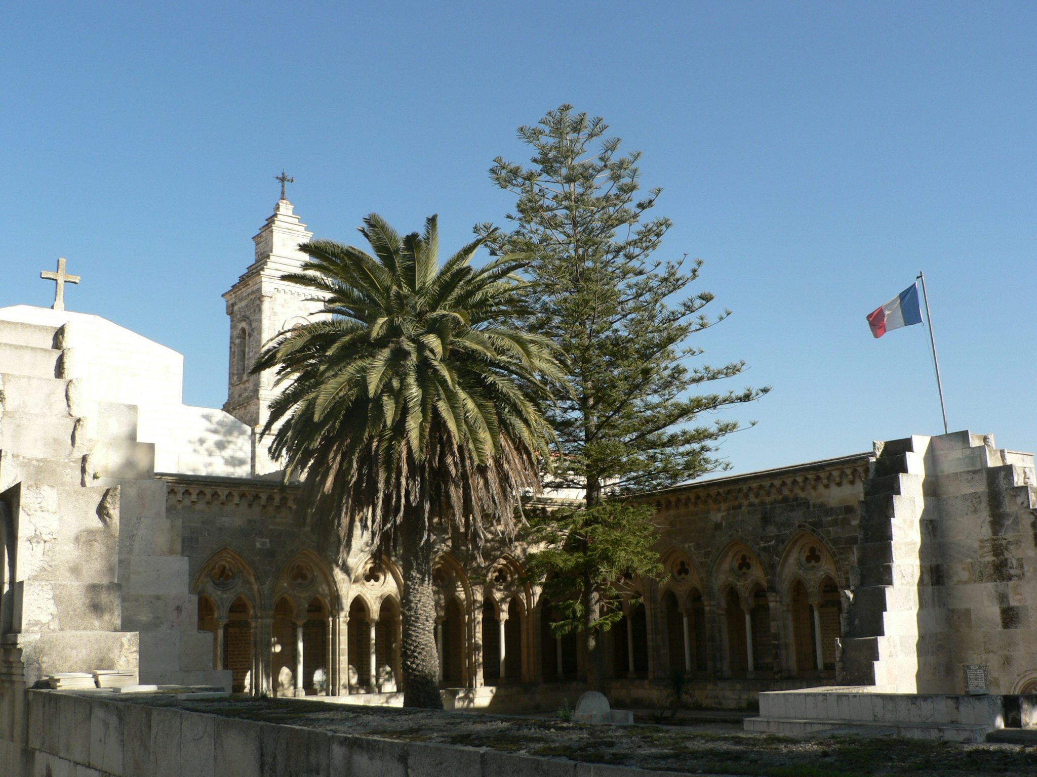 Eglise Pater Noster